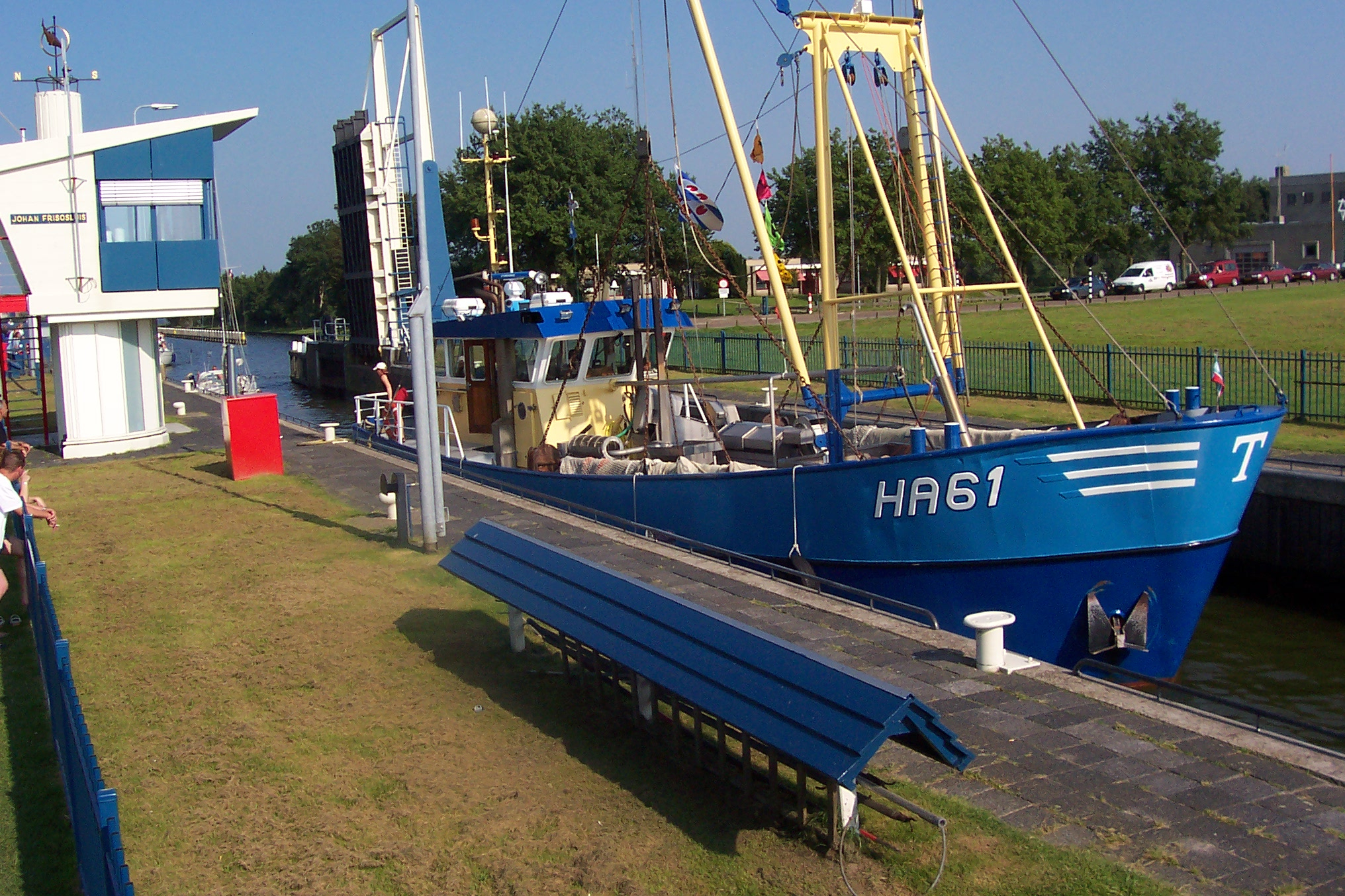 Johan Frisosluis, Stavoren